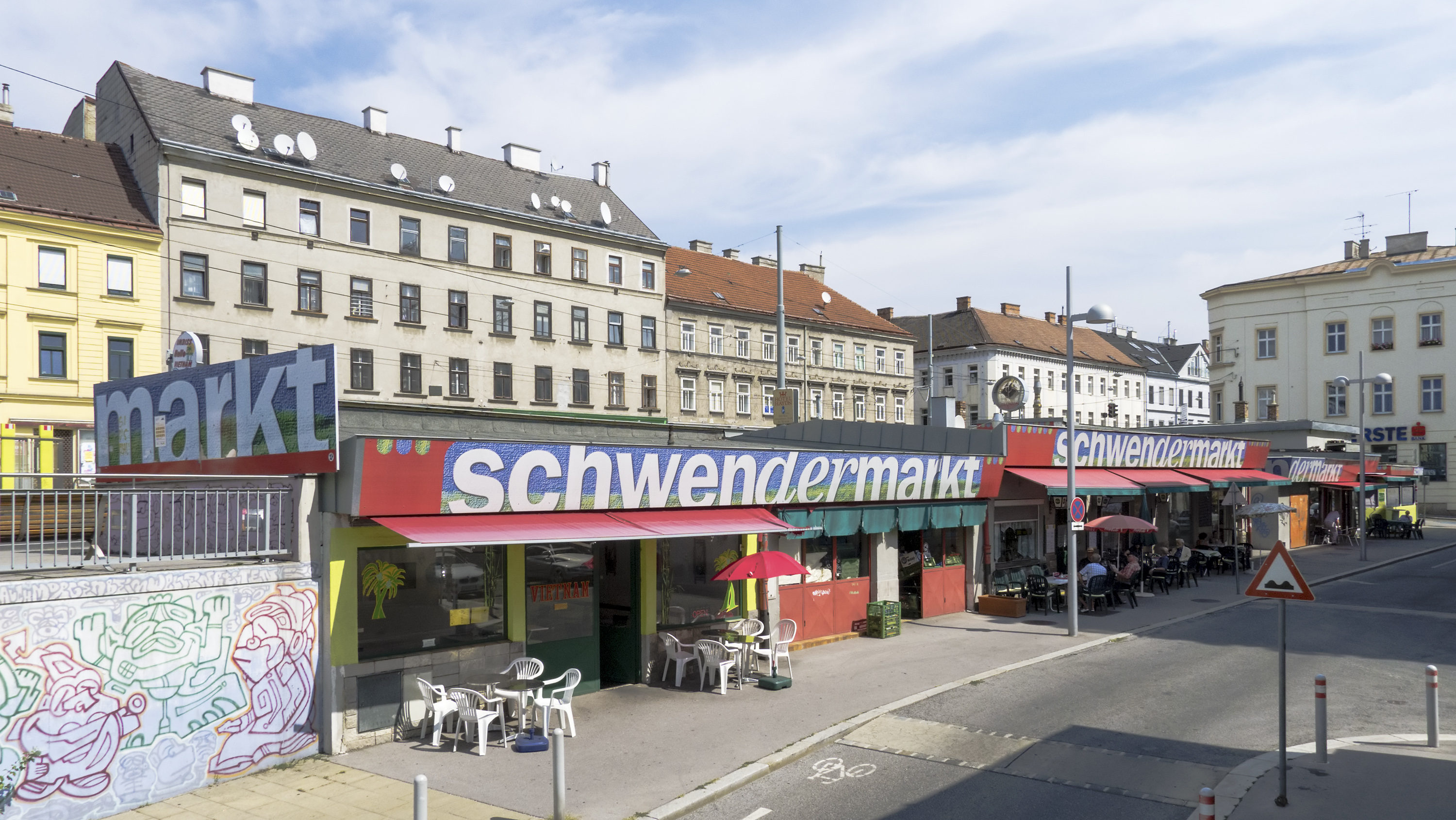 Schwendermarkt in Wien 15, Schwendergasse 29